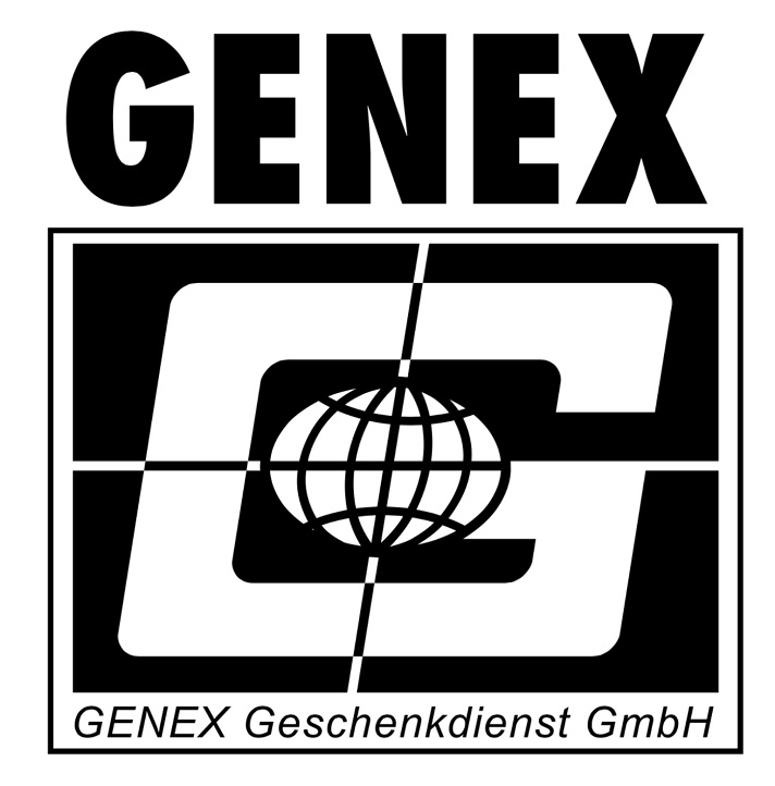 Genex Logo